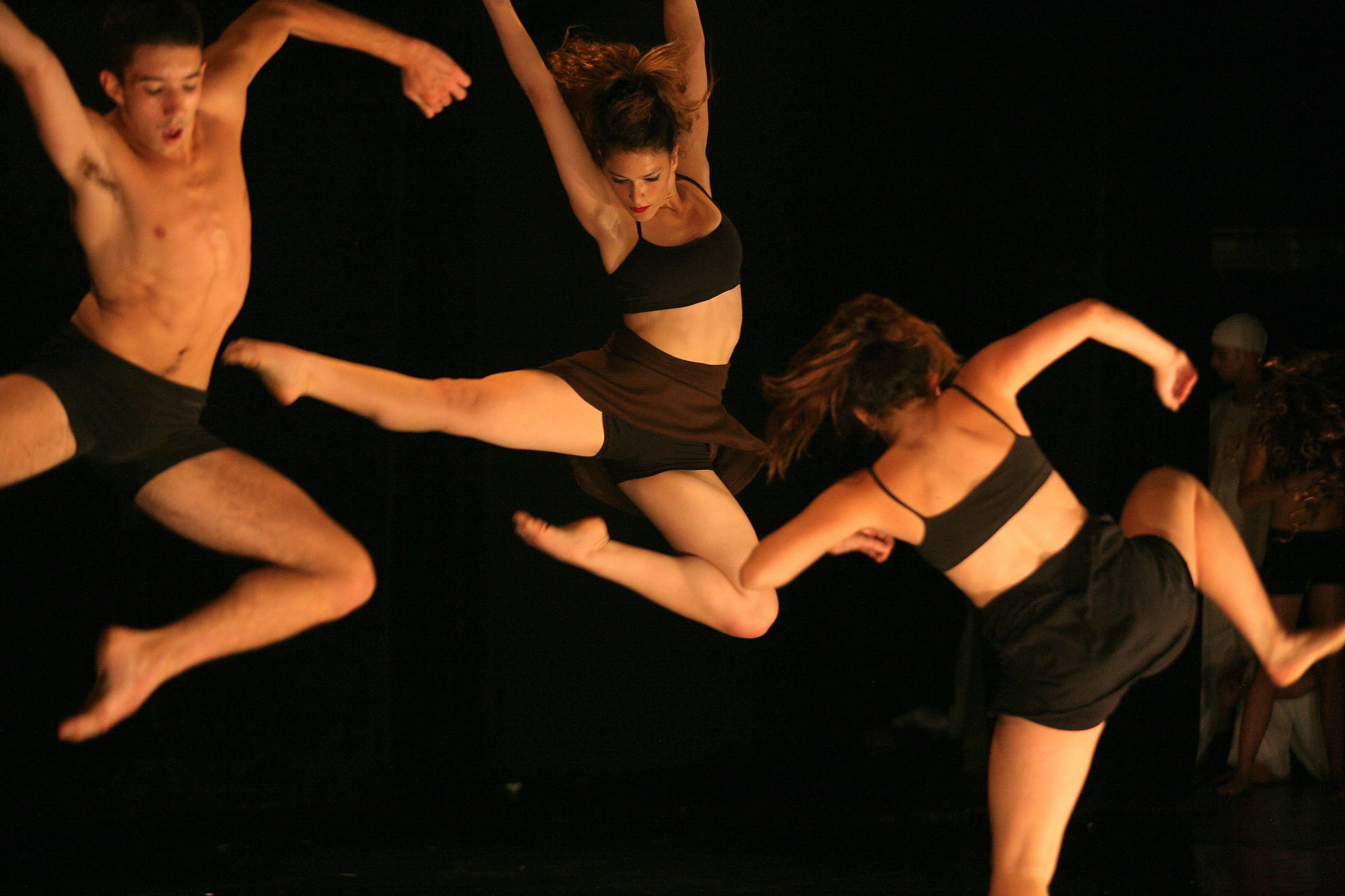 להקת מחולה מתוך המופע "על קו המים". צילום: אורן מנצורה